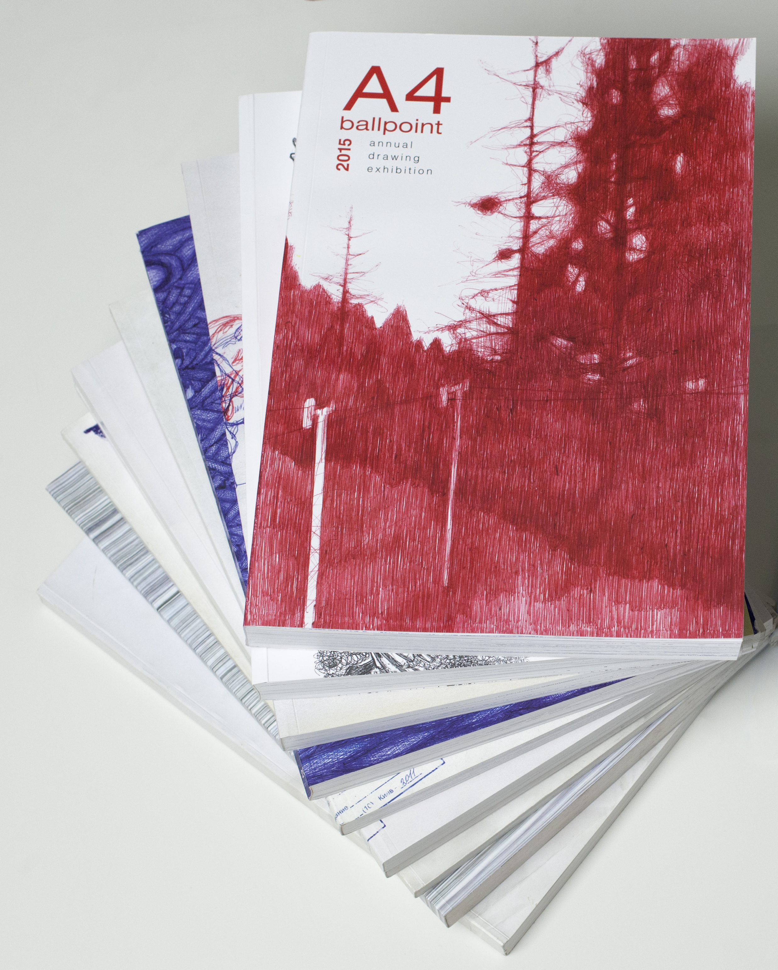 Фото каталогів проекту за 2006-2015 рік.